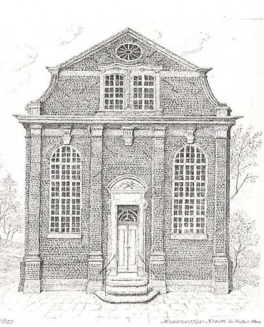 Federzeichnung von Ludwig Schwarz der alten Mennonitenkirche an der Großen Freiheit von 1918